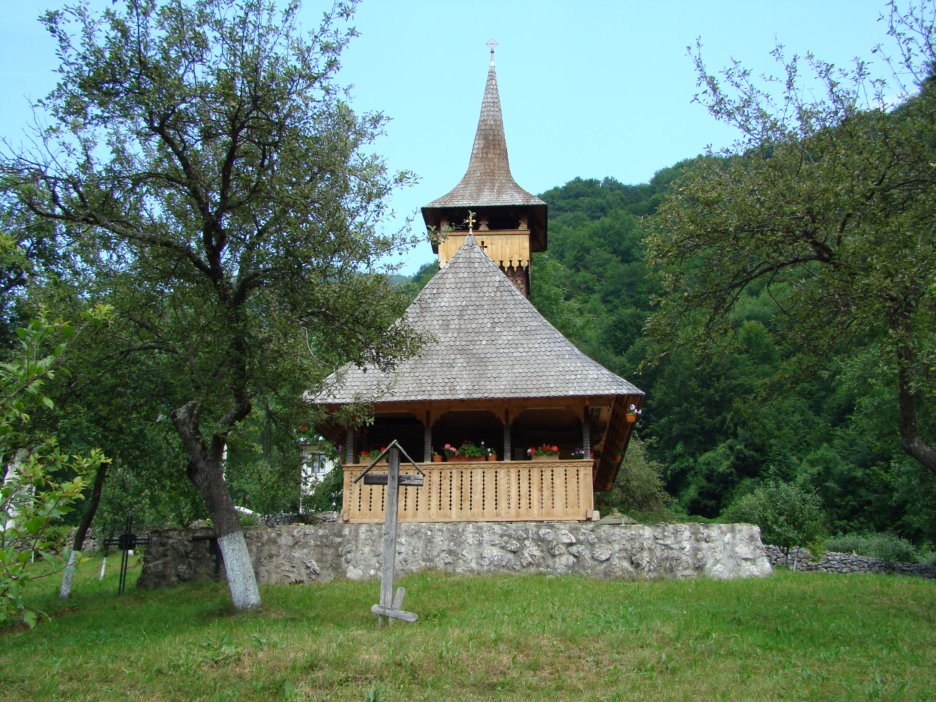 Biserica de lemn „Sf.Cuvioasă Paraschiva” Sub Piatră-Alba